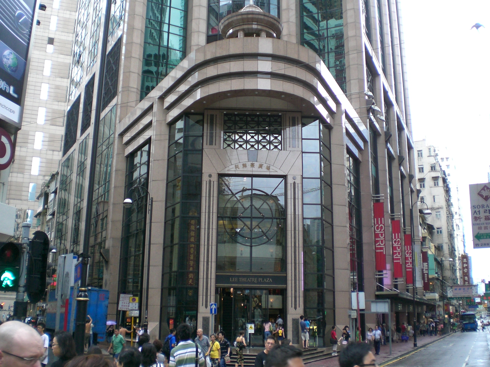 波斯富街, 銅鑼灣, Causeway Bay Author= Kwanyatsw